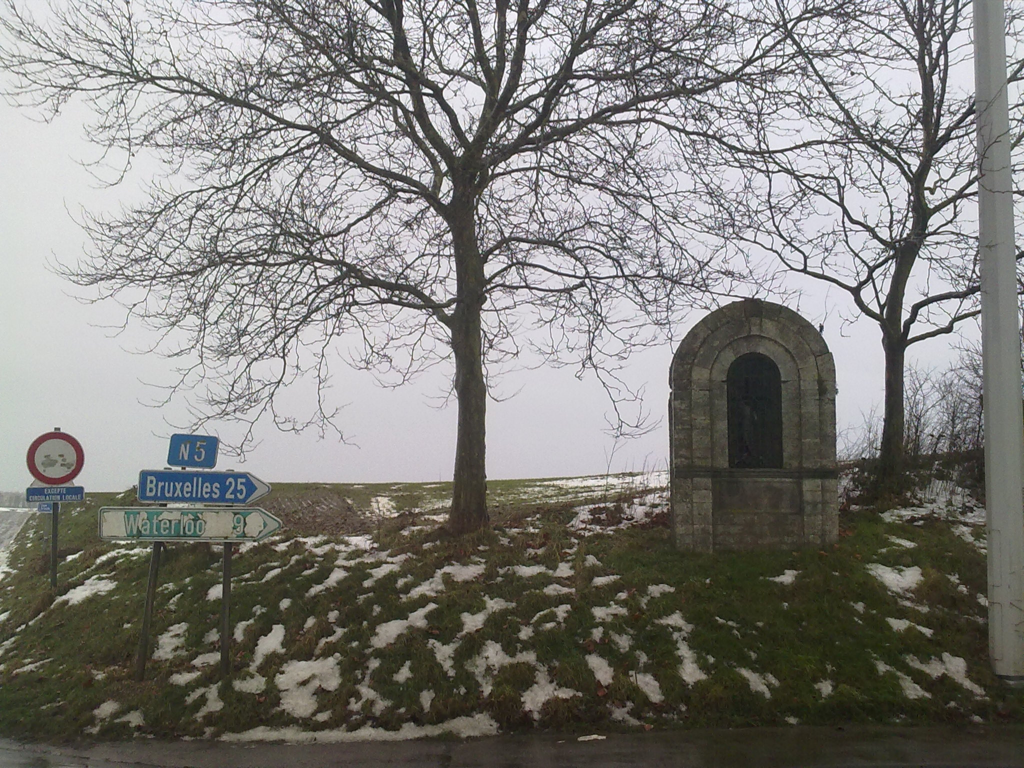 Chapelle du Crucifix (?) au croisement de la N5 et du Chemin du Crucifix à Plancenoit (Brabant Wallon). Belgique.